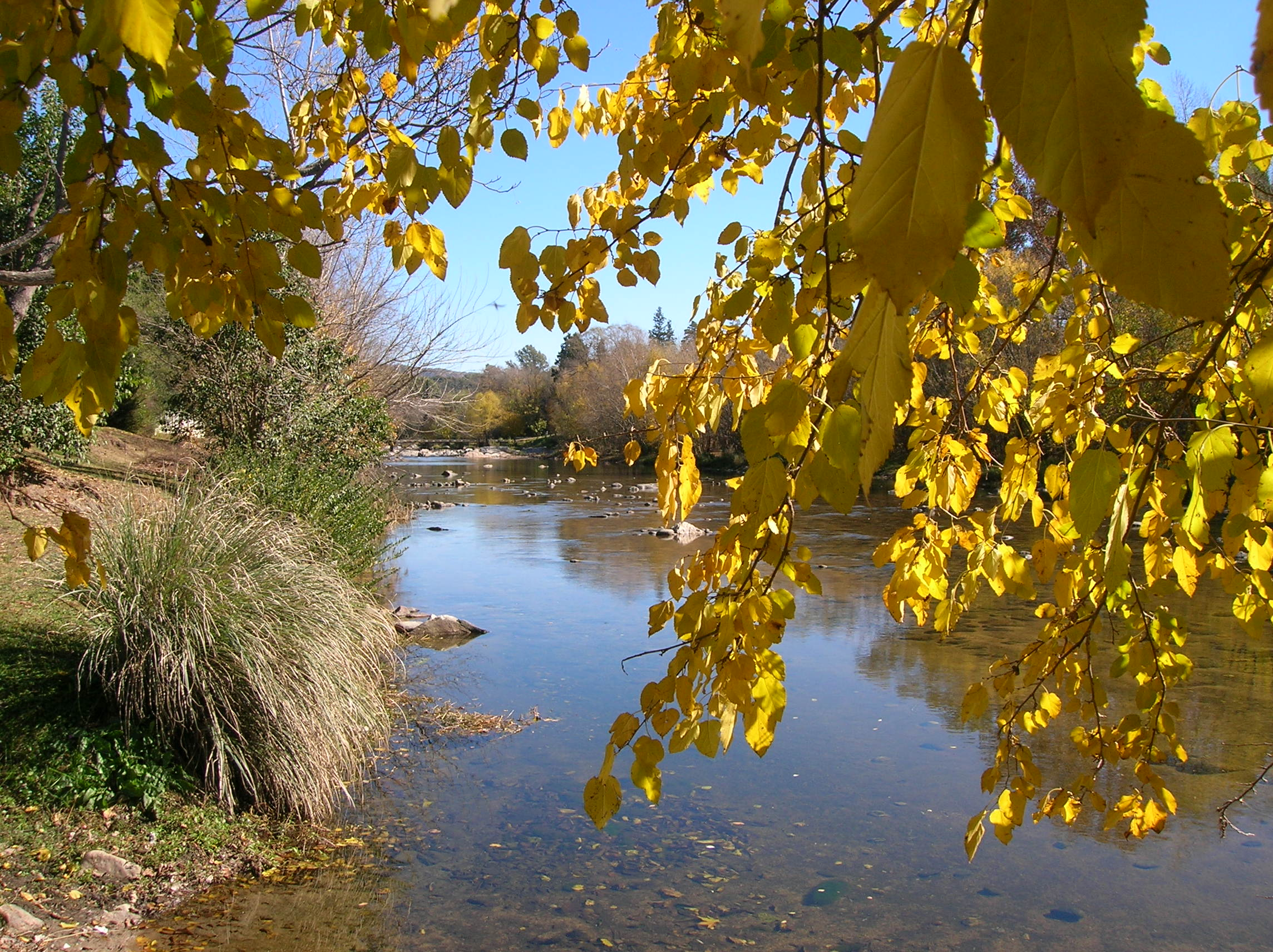 Imagen del rio Anizacate en Otoño